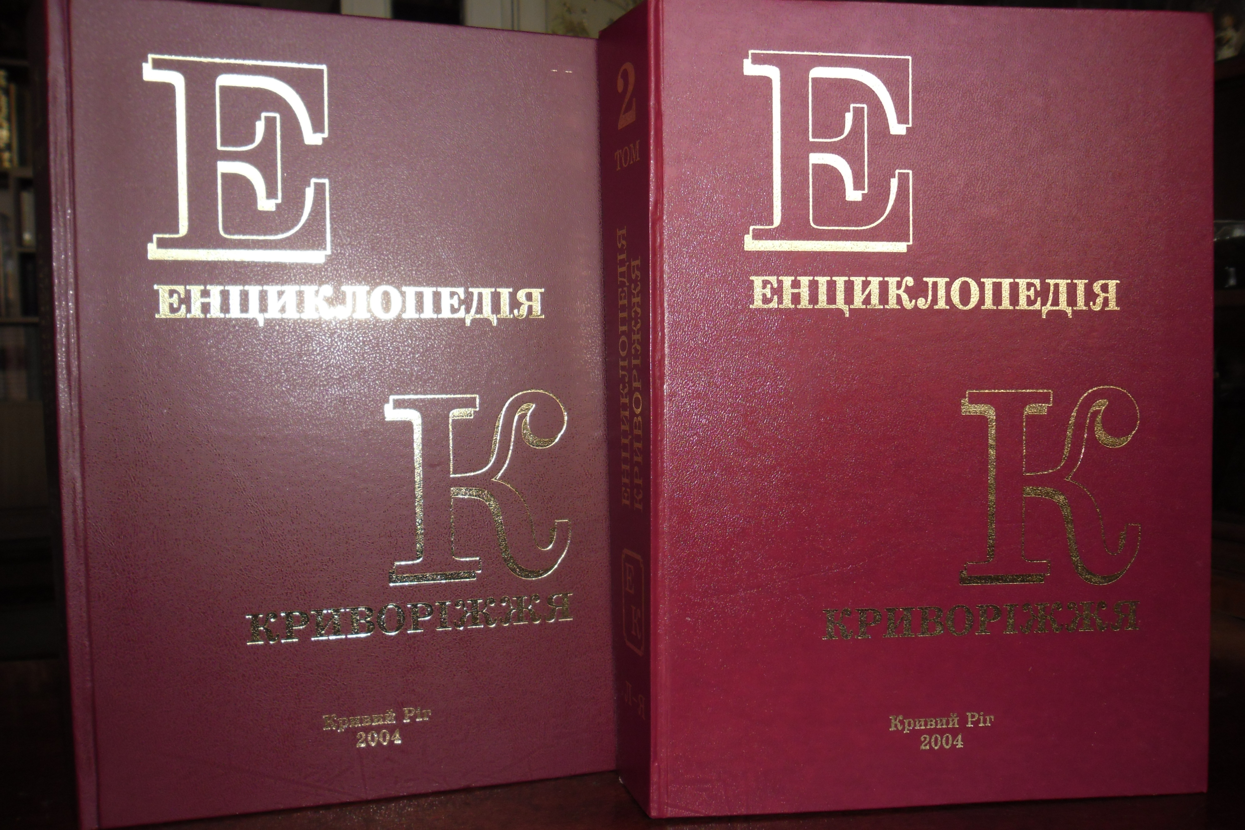 Енциклопедія_Криворіжжя: Фото